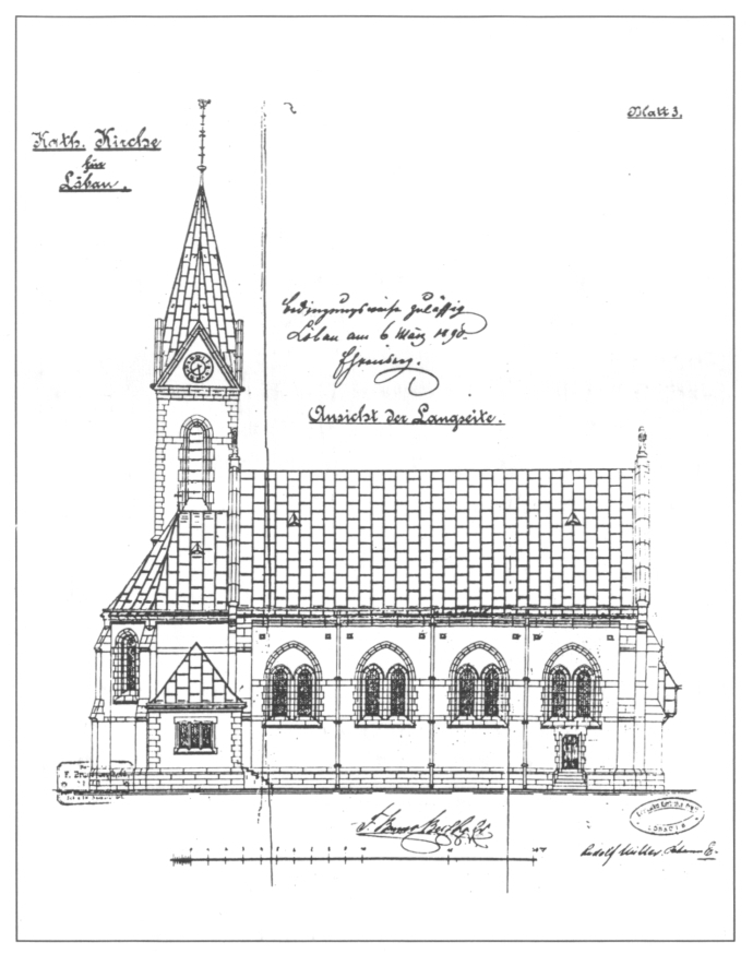 Zeichnung für den Bau der katholischen Kirche in Löbau